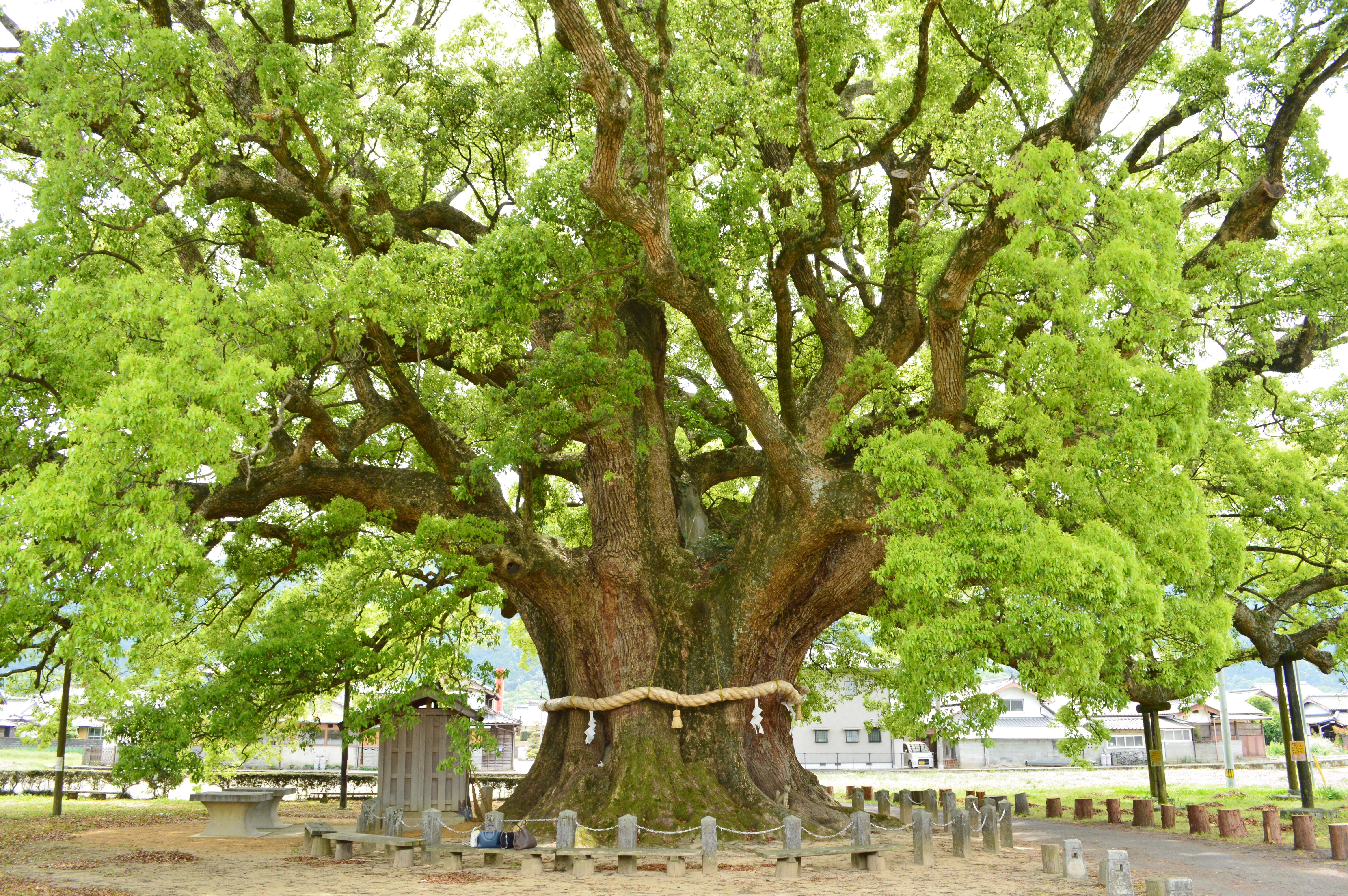 加茂の大クス Nikon D3200